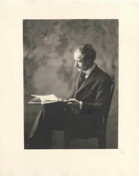 Ritratto maschile fotografico realizzato da Giuseppe Mentessi con regia di Emilio Sommariva